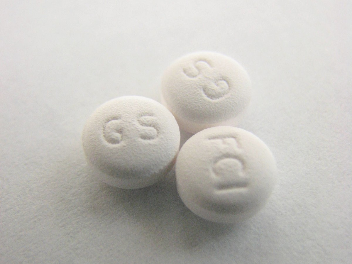 Paroxetine (Paxil) pills.